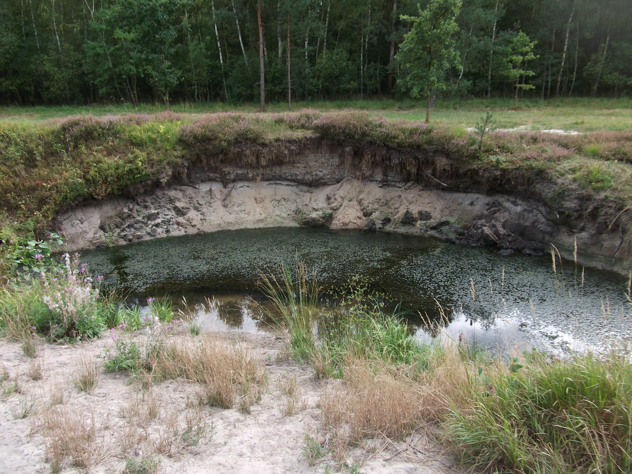 Ursprüngliche Beschreibung: "Aufschluß am renaturierten Ottergraben." Eventuell Irrtum. Laut Koordinaten scheint es sich um den Entengraben zu handeln.